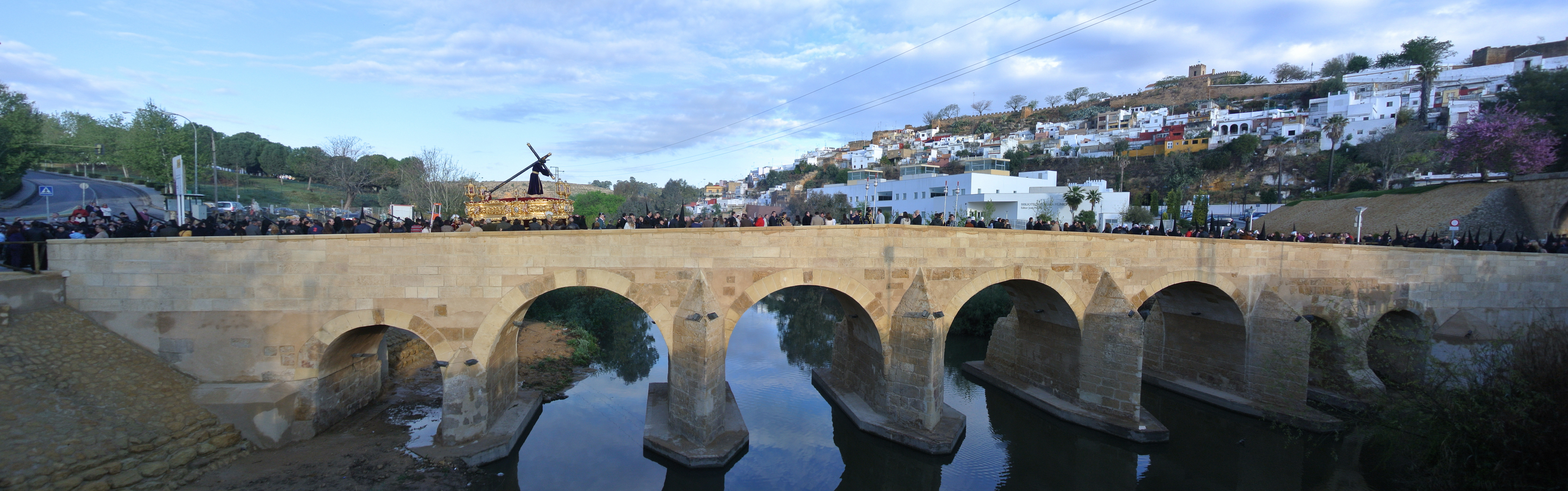 Paso Cofradia Puente Jesús Nazareno